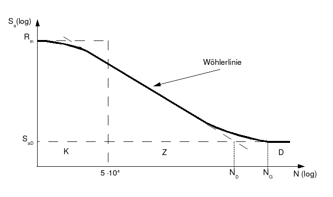 Woehlerlinie — K ist der Bereich der Kurzzeitfestigkeit, Z ist der Bereich der Zeitfestigkeit, D ist der Bereich der Dauerfestigkeit.